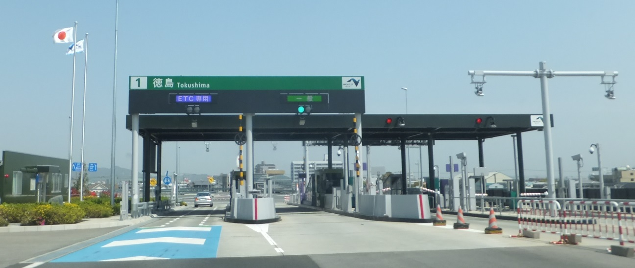 徳島インターチェンジ